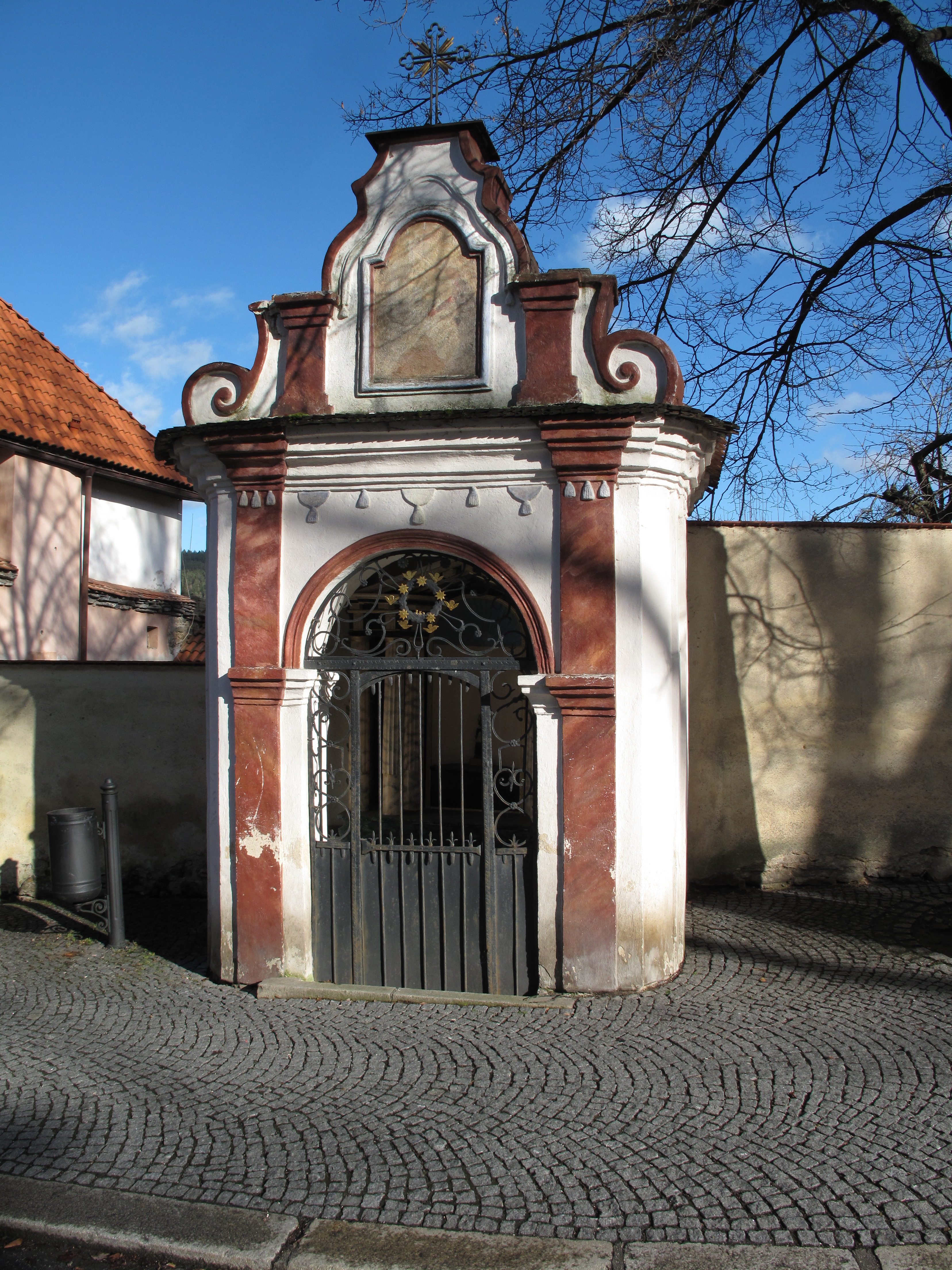 Kaple svatého Jana Nepomuckého v Solní ulici v Prachaticích, Česká republika.